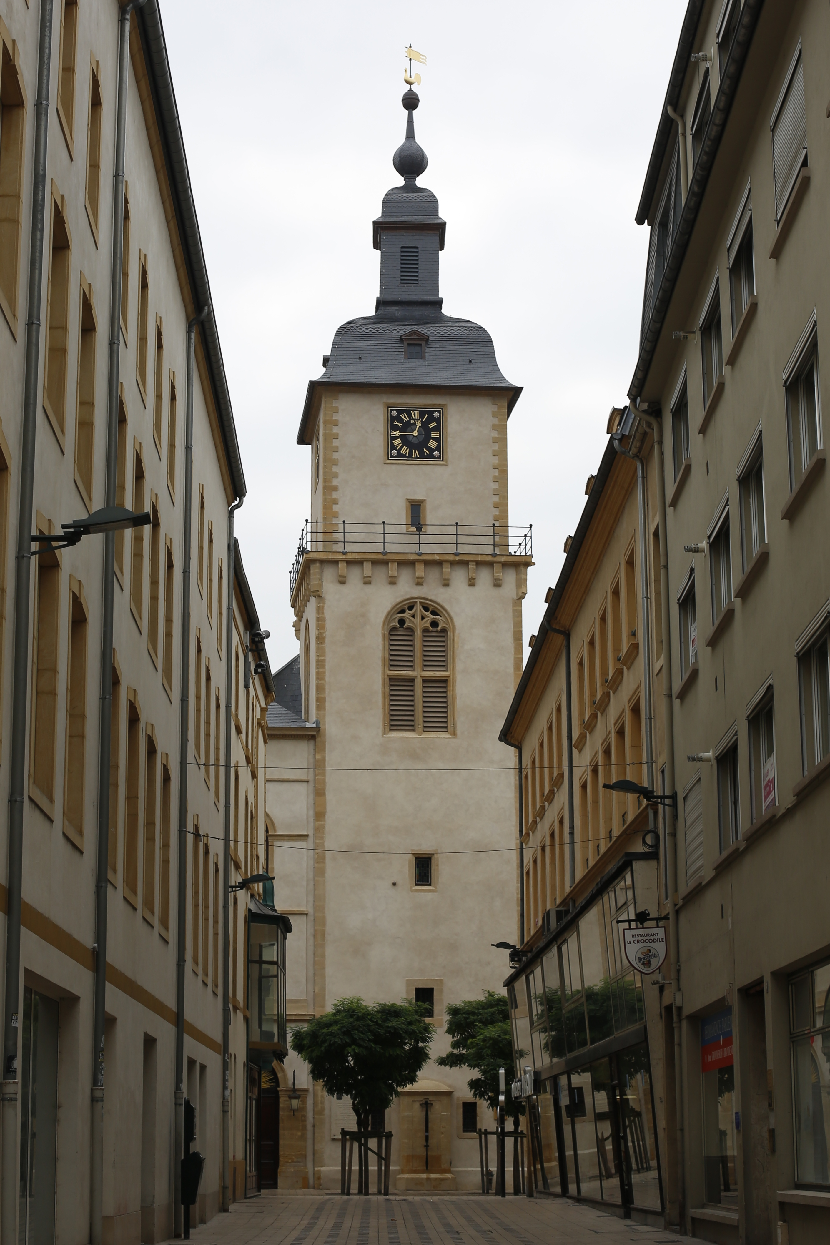 Beffroi de Thionville.